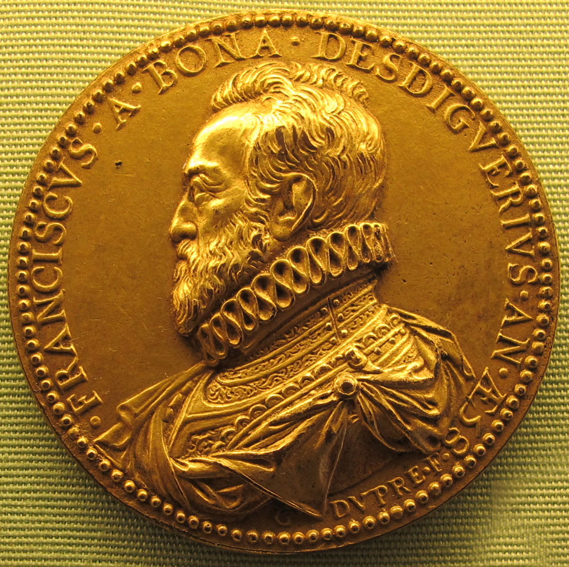 Médaille de Guillaume Dupré représentant François de Bonne, seigneur de Lesdiguières, 1600.